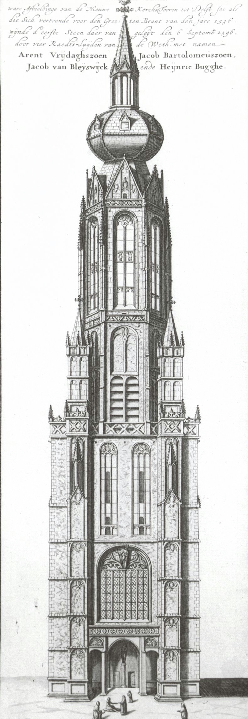 NEDERLANDS HERVORMDE KERK (NIEUWE KERK): Exterieur TOREN, VOOR DE BRAND VAN 1536, TEKENING VAN A. DE BLOIS (1679)